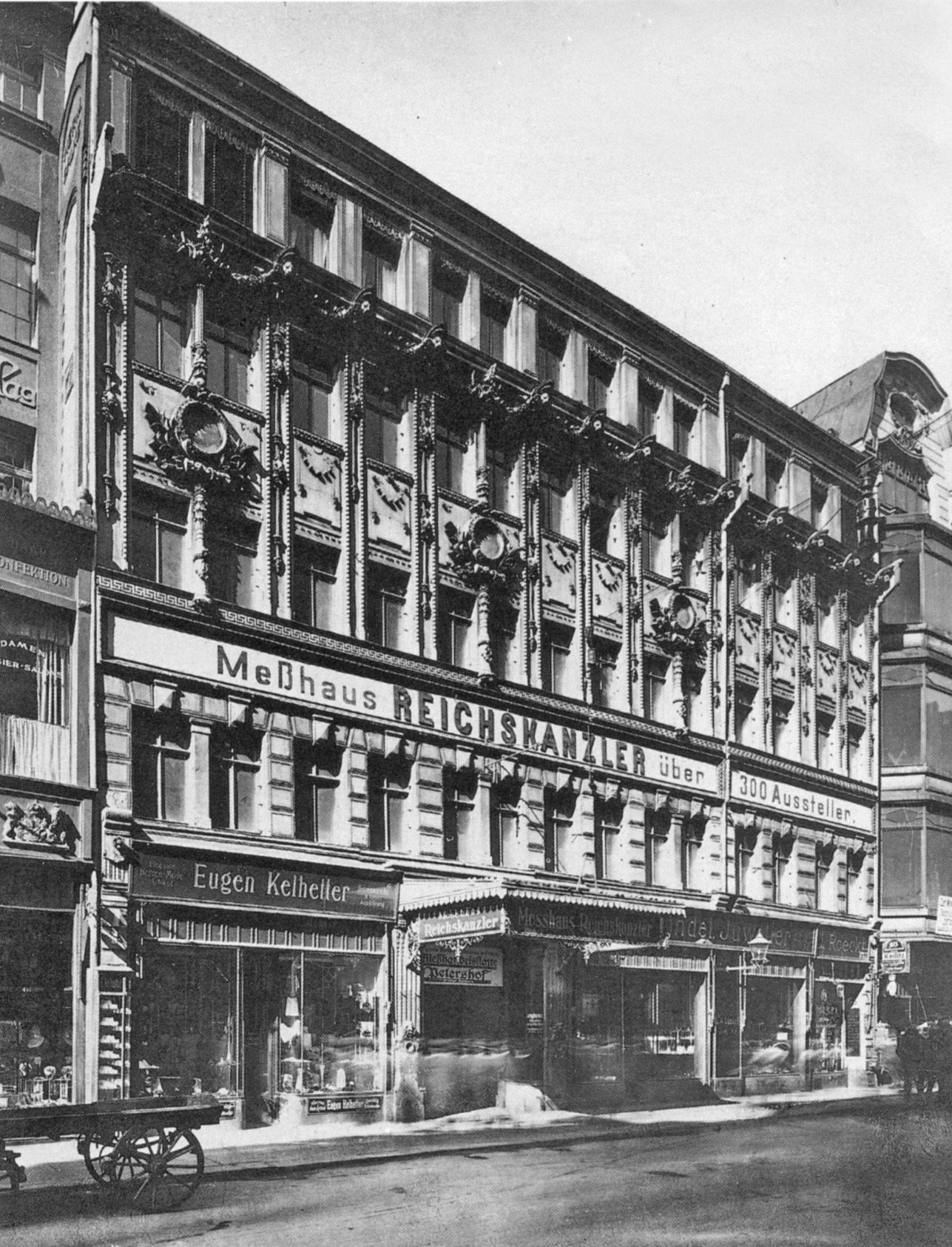 Leipzig: Das Meßhaus Reichskanzler um 1920. 1868/69: Hotel-Neubau „Hotel de Russie“, die Namensgebung erfolgte aus Anlass der Befreiung Deutschlands durch die Russen in der Völkerschlacht bei Leipzig 1915/18: das Hotel trug den Namen „Hotel Reichskanzler“ 1918: Umbau zum „Meßhaus Reichskanzler“ 1927/28: Abriss von 10 alten Grundstücken und Errichtung des Messehauses „Petershof“ unter dem Architekten Alfred Liebig